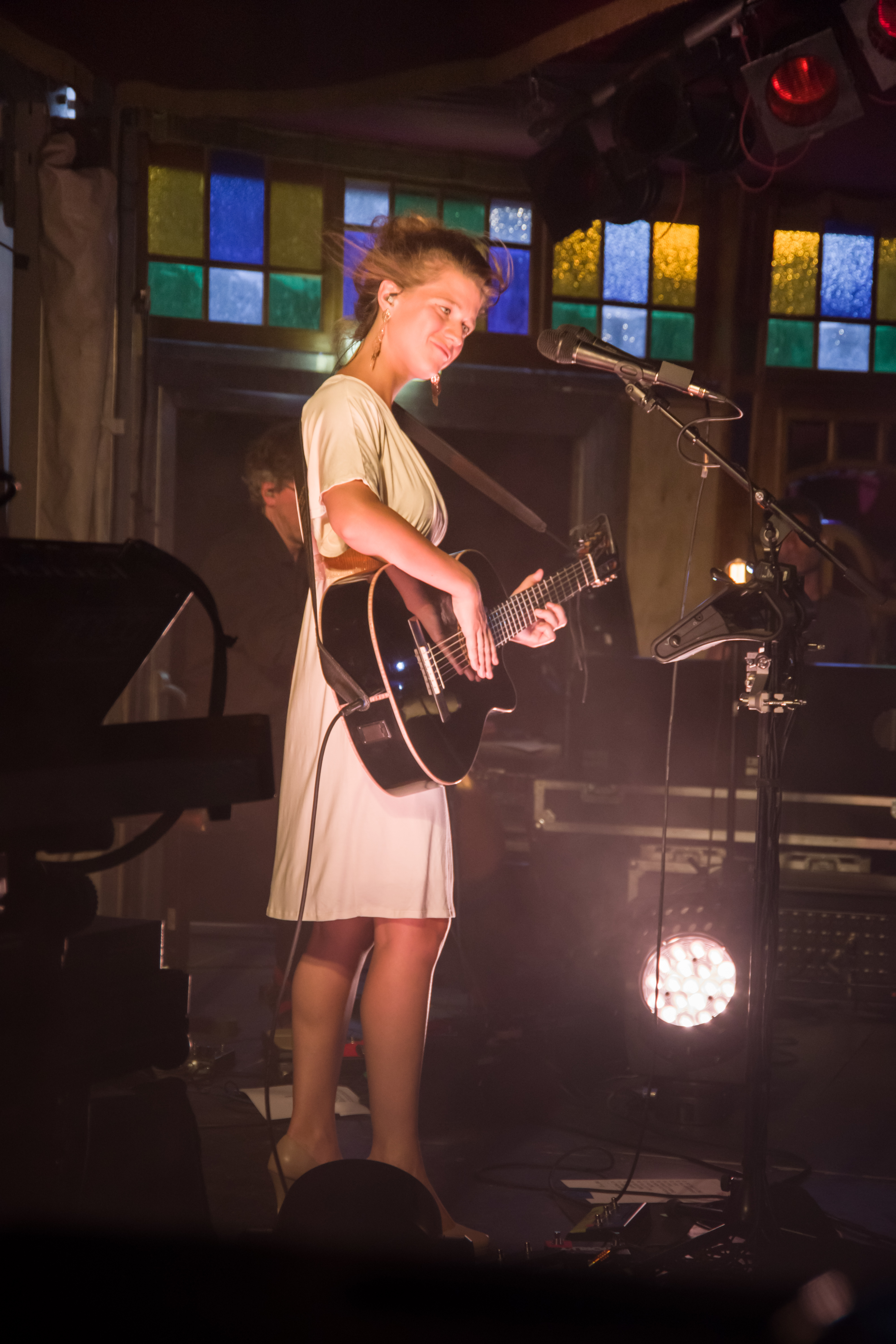 Das Zelt-Musik-Festival 2018 in Freiburg im Breisgau 26.07.2018 Selah Sue